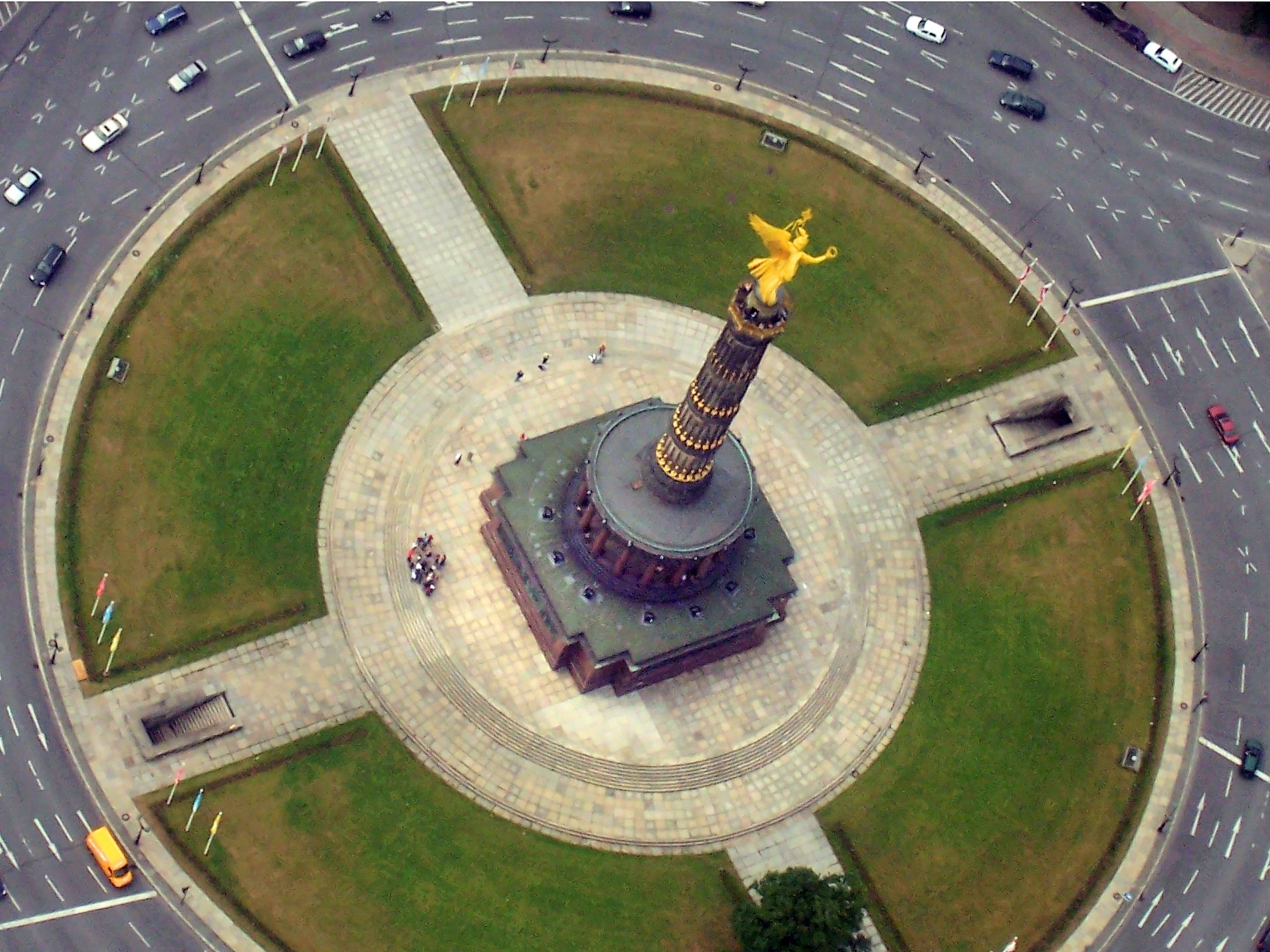 Luftaufnahme der Siegessäule